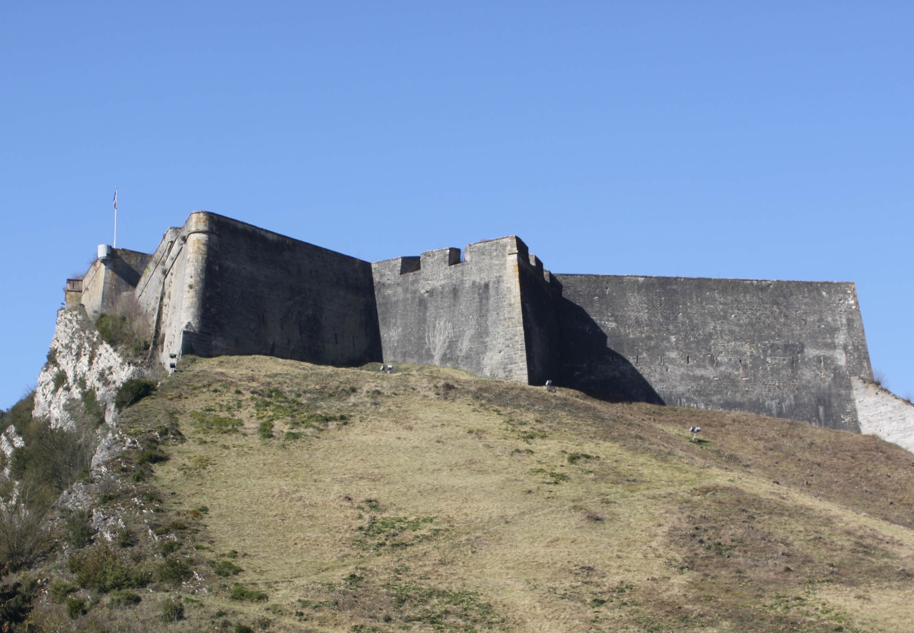 De Fort de Charlemont vu Givet aus gesinn